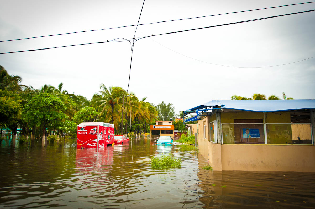 Imagenes tomadas minutos despues del arribo del Huracan Karl a la Cd. y Puerto de Veracruz